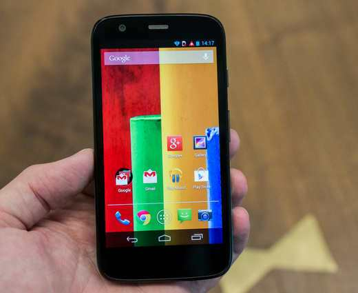 el telefono Motorola Moto G es un telefono inteligente de gama media alta, fabricado por motorola y google